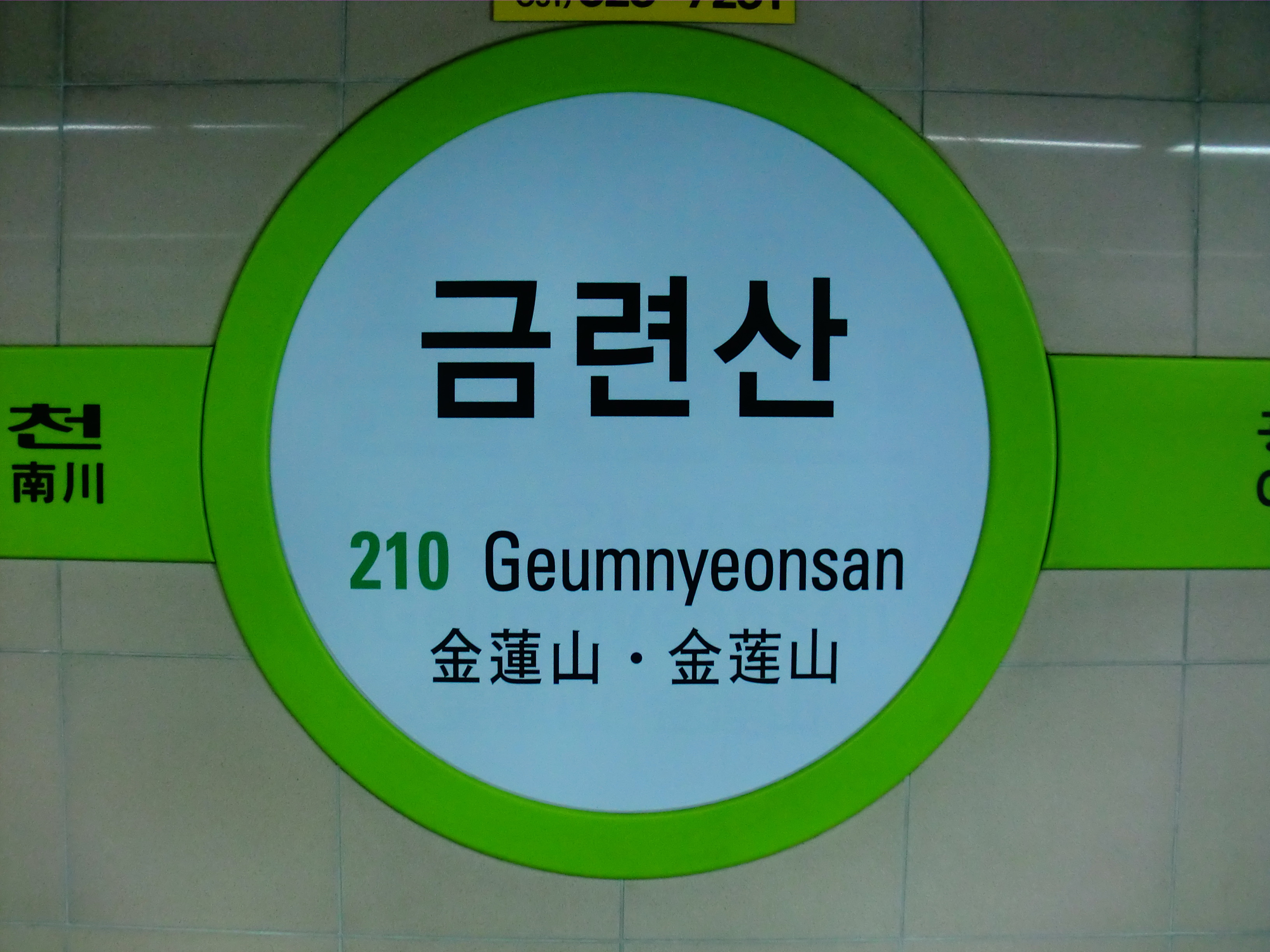 부산도시철도2호선 금련산역의 역명판